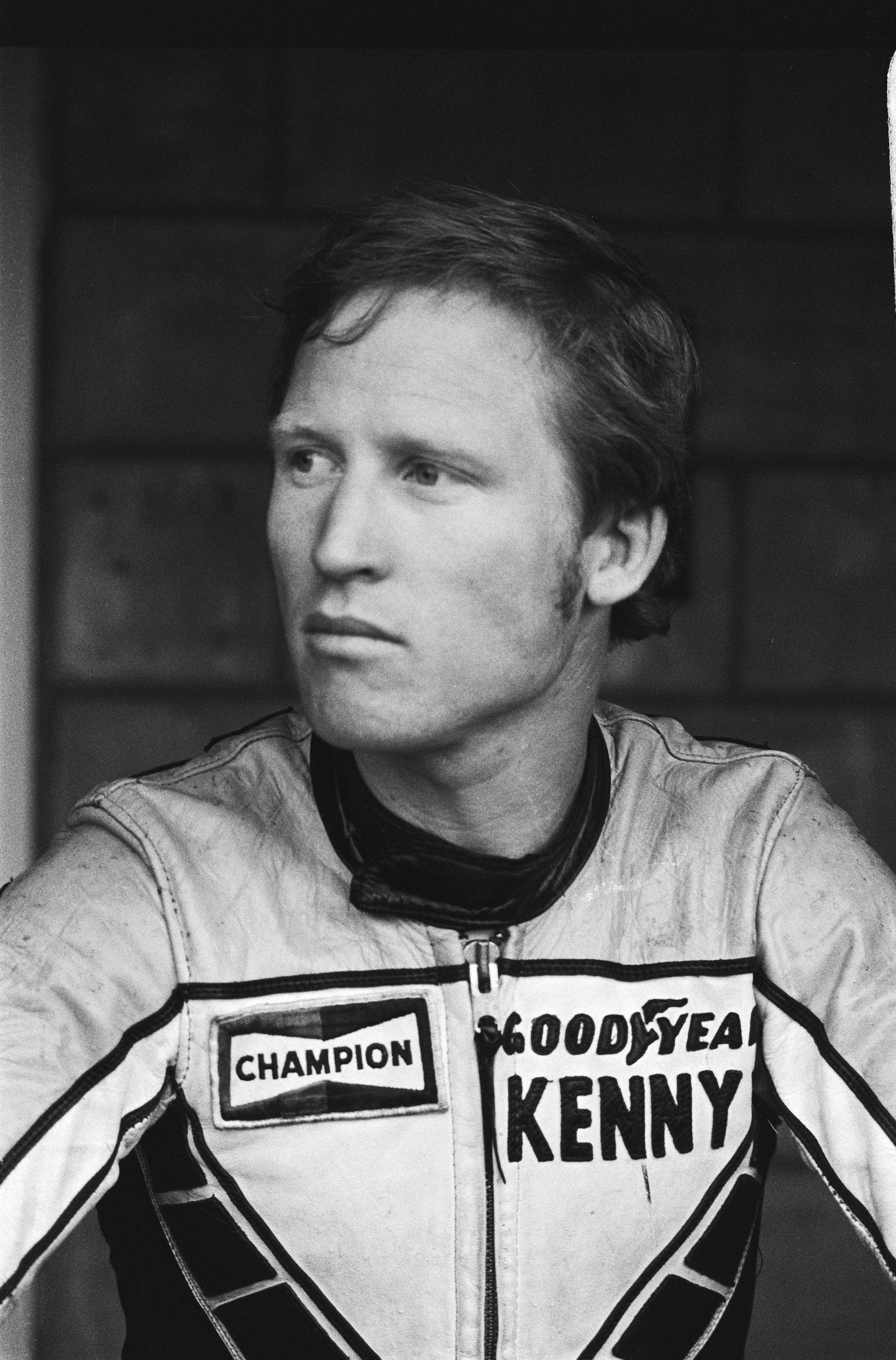 Collectie / Archief : Fotocollectie Anefo Reportage / Serie : TT Assen 1978 Beschrijving : Training TT Assen; Kenny Roberts Datum : 22 juni 1978 Locatie : Assen Trefwoorden : motorcoureurs, motorsport, portretten Persoonsnaam : Roberts, Kenny Instellingsnaam : TT Fotograaf : Suyk, Koen / Anefo Auteursrechthebbende : Nationaal Archief Materiaalsoort : Negatief (zwart/wit) Nummer archiefinventaris : bekijk toegang 2.24.01.05 Bestanddeelnummer : 929-7835